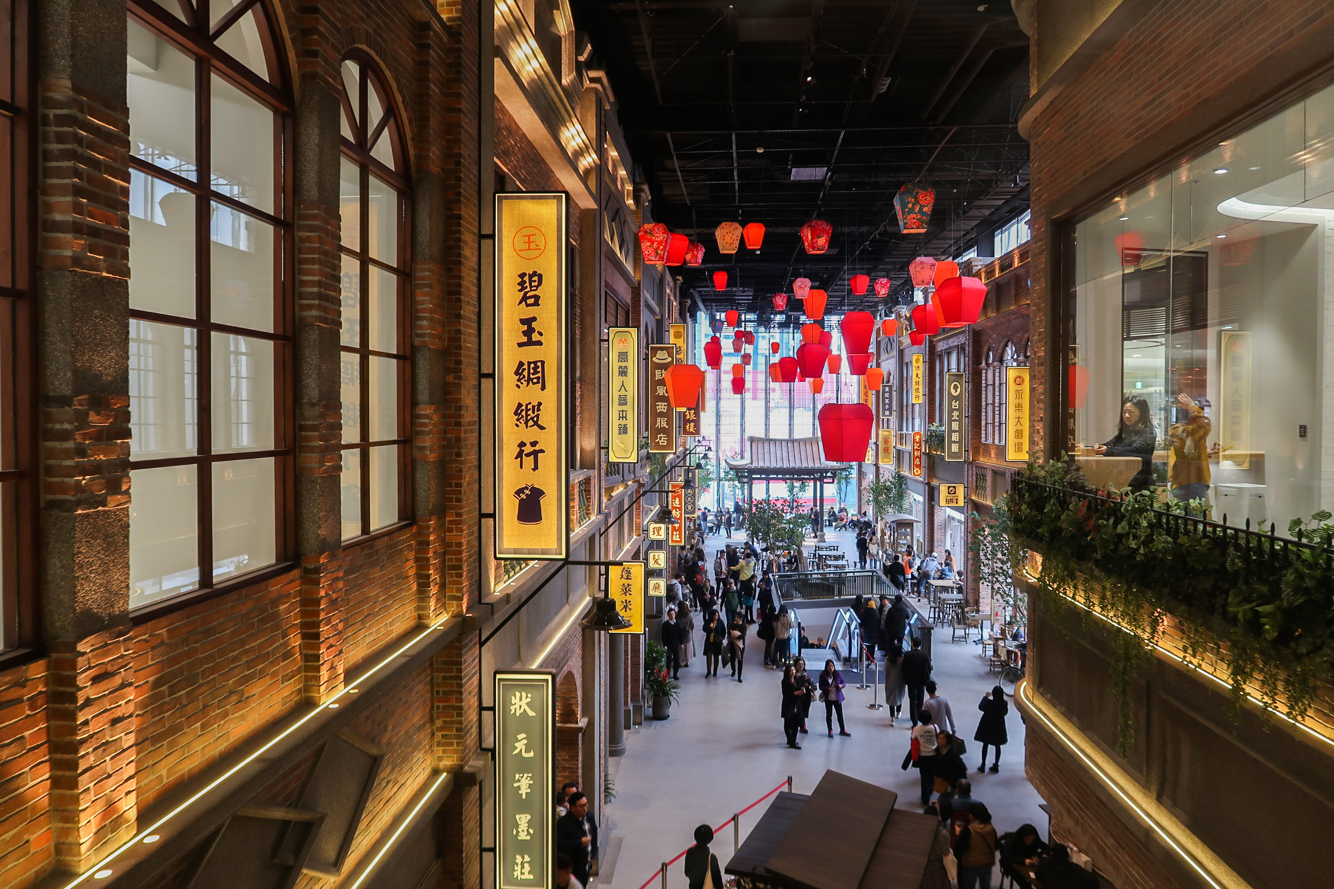 FEDS Taipei A13 Store Level 4 Atrium